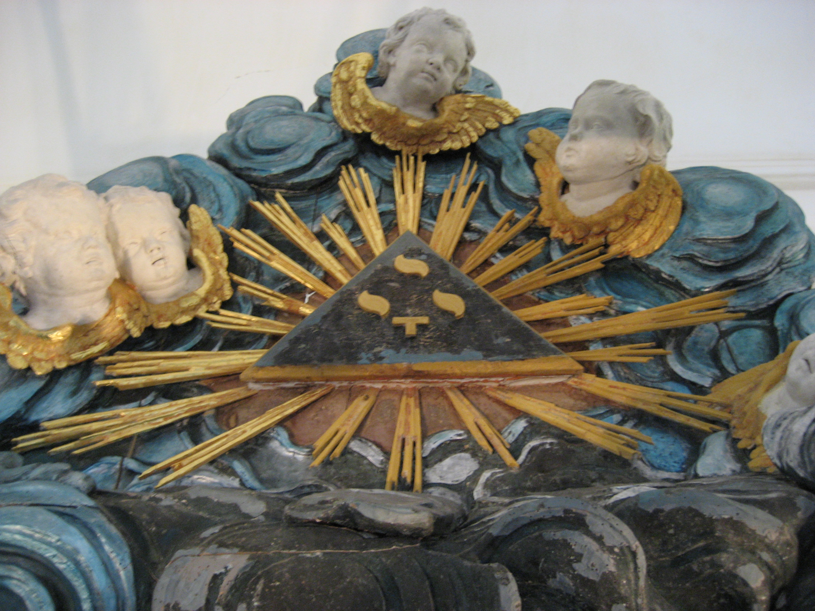 Schöpfungswort in der Gloriole auf dem Kanzelaltar (während der Restaurierung)